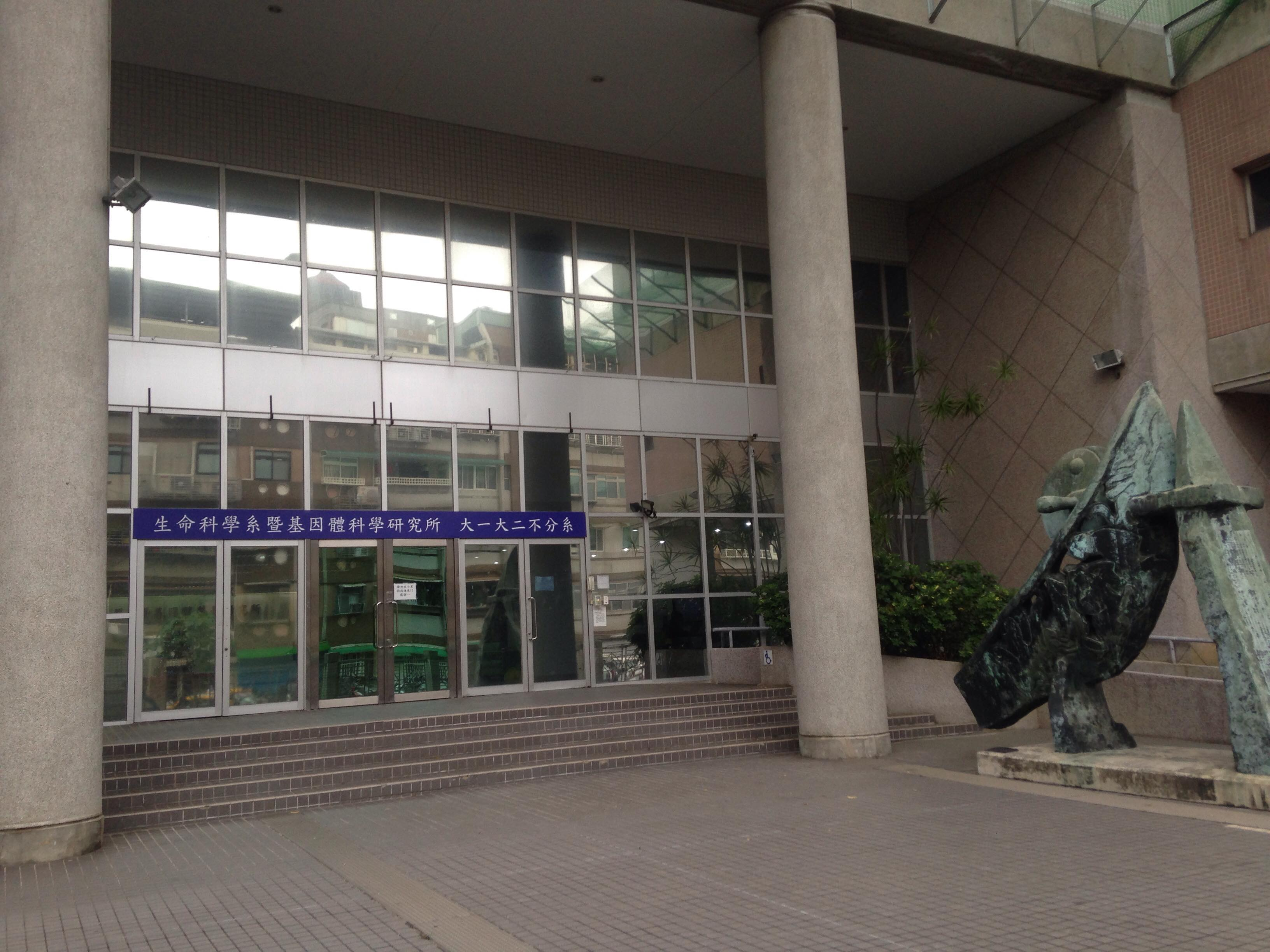 國立陽明大學傳統醫學大樓